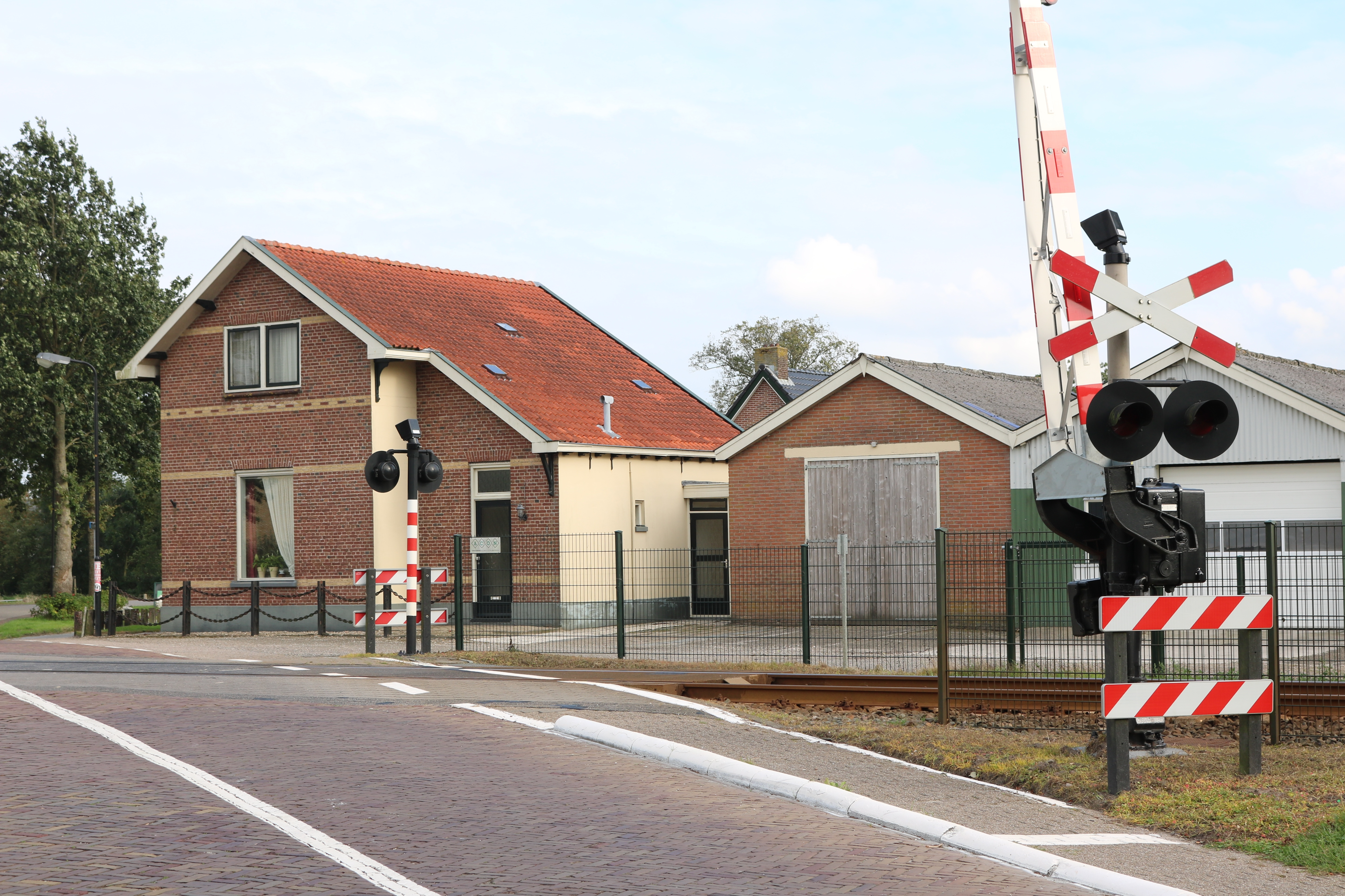 Tytsjerk - Wachterswoning (foto: Daniel van der Ree, 20 september 2018)